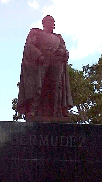 Estatua del General Jose Francisco Bermudez (Aerocar 1782 - Cumana 1831) locaclizada en el Paceo Los Proceres en Caracas - Venezuela